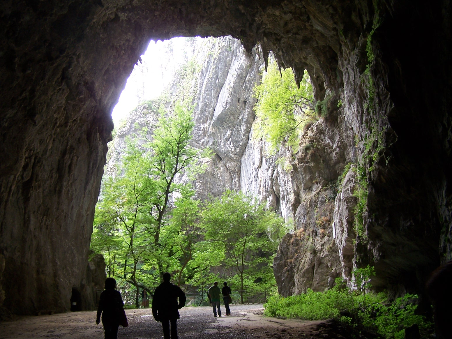 Škocjanske jame Cave entrance